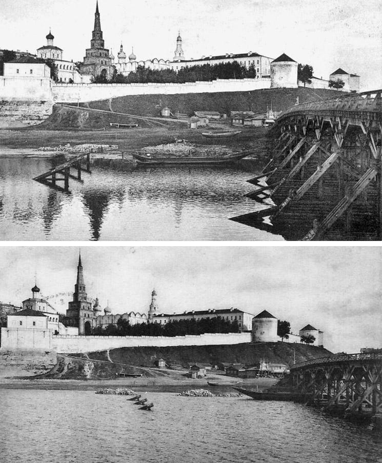 Хижицкий мост (ранее Кизический, ныне Кремлёвский) в начале XX века